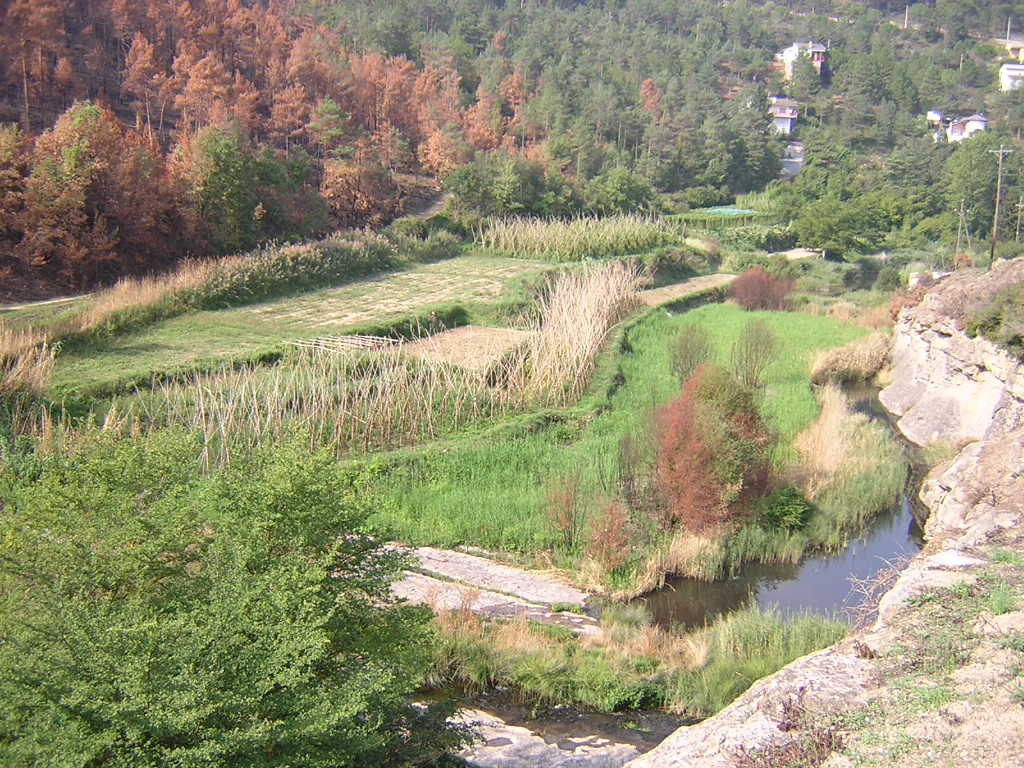 Els Horts de la Baga del Solà (Monistrol de Calders, Moianès)